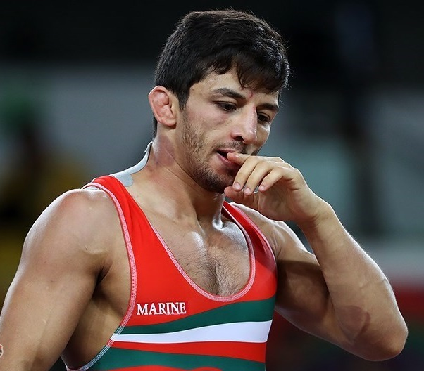 رقابت‌های کشتی فرنگی وزن ۵۹ کیلو - المپیک ریو ۲۰۱۶